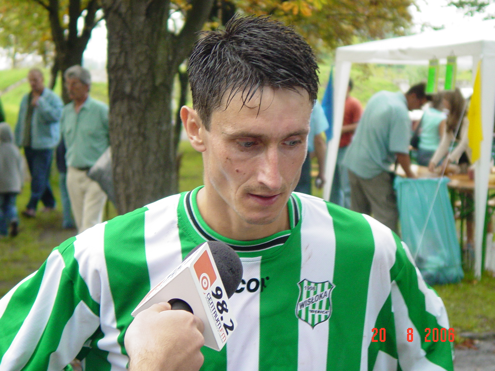 Obecnie grający trener Klubu Sportowego Wisłoka Debica